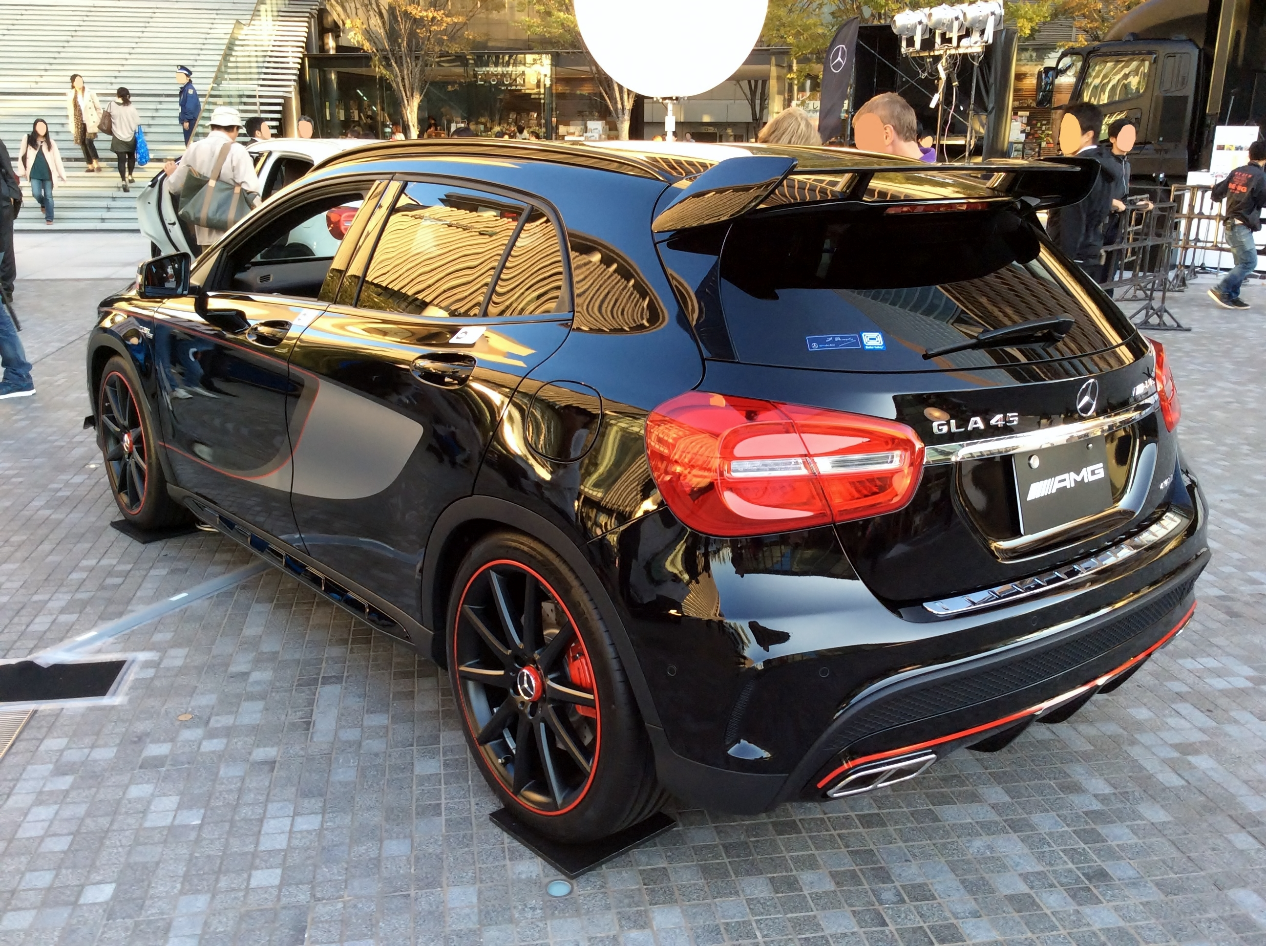 X156型メルセデス・ベンツGLA45 AMG 4マティック エディション1をリアから撮影。